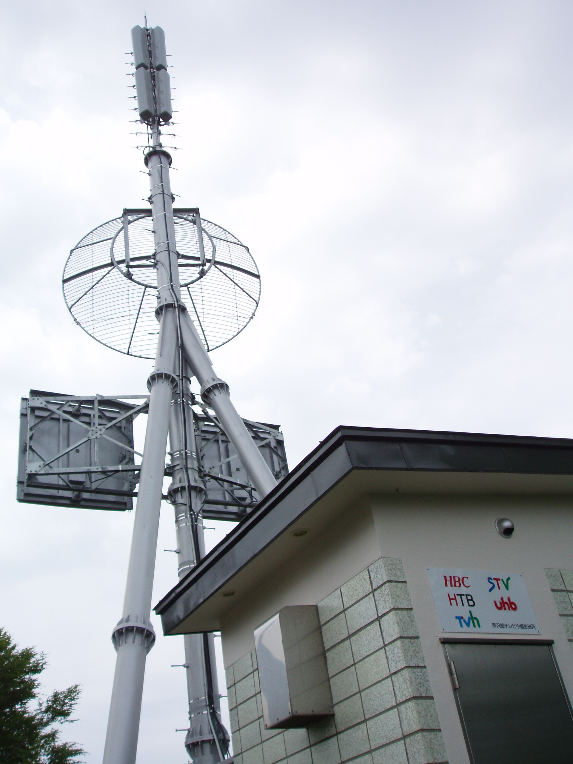 厚沢部中継局 HBC・STV・HTB・UHB・TVh送信設備